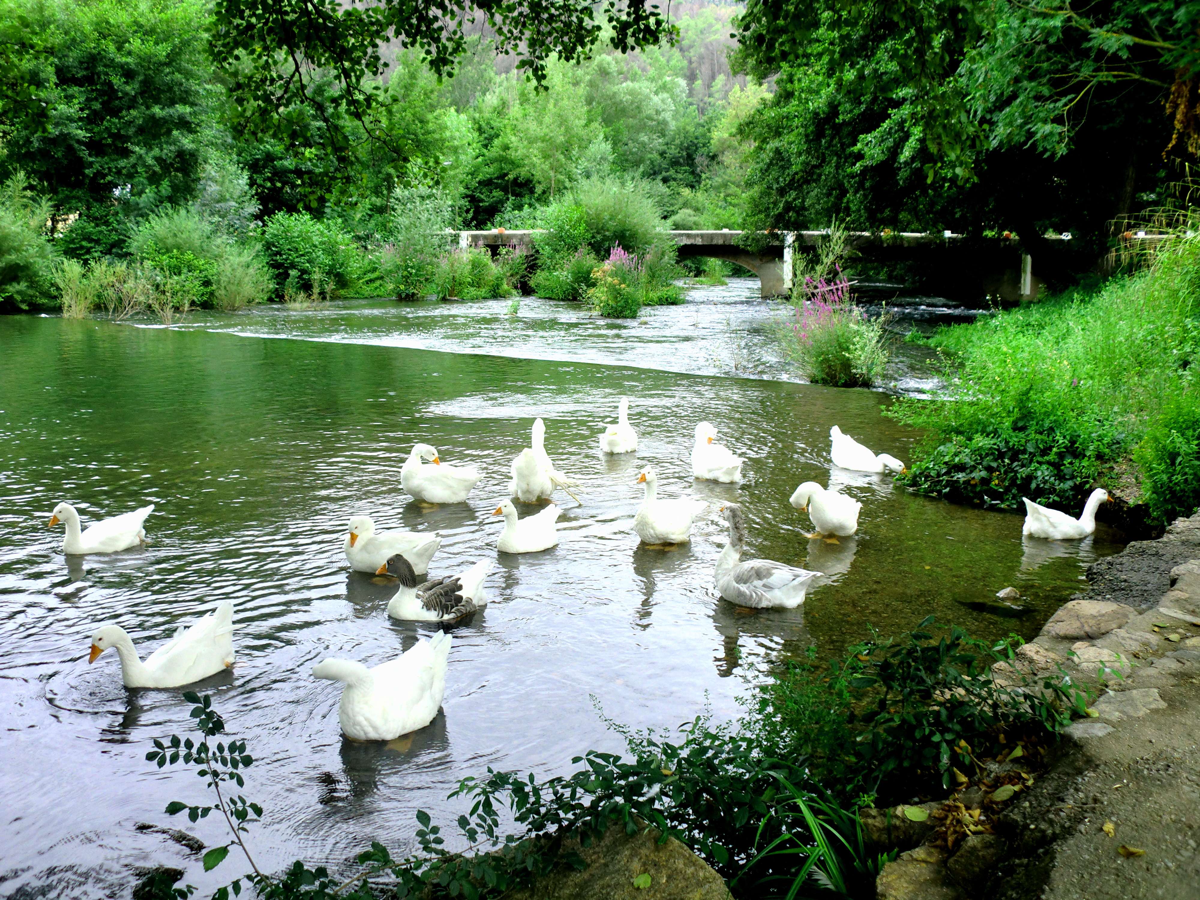 La Muga al seu pas per Boadella d'Empordà, a l'entrada del poble.